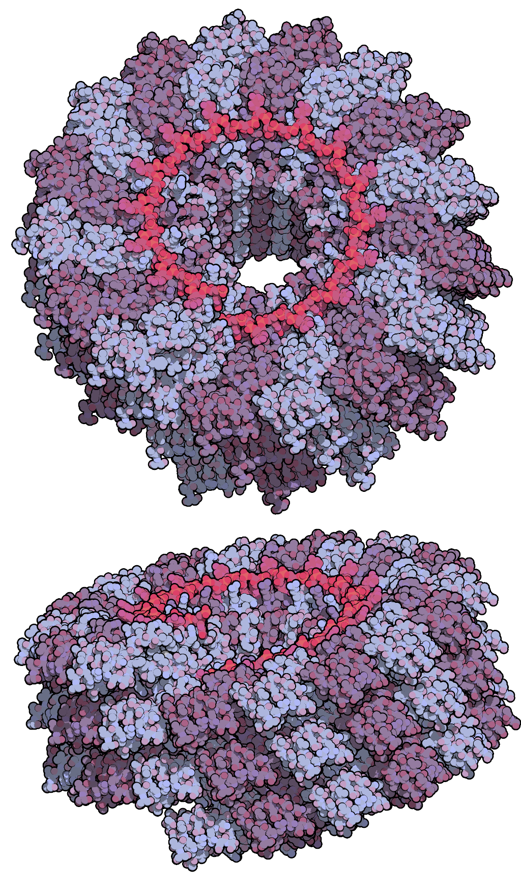 Модель фрагменту капсиду віруса тютюнової мозаїки